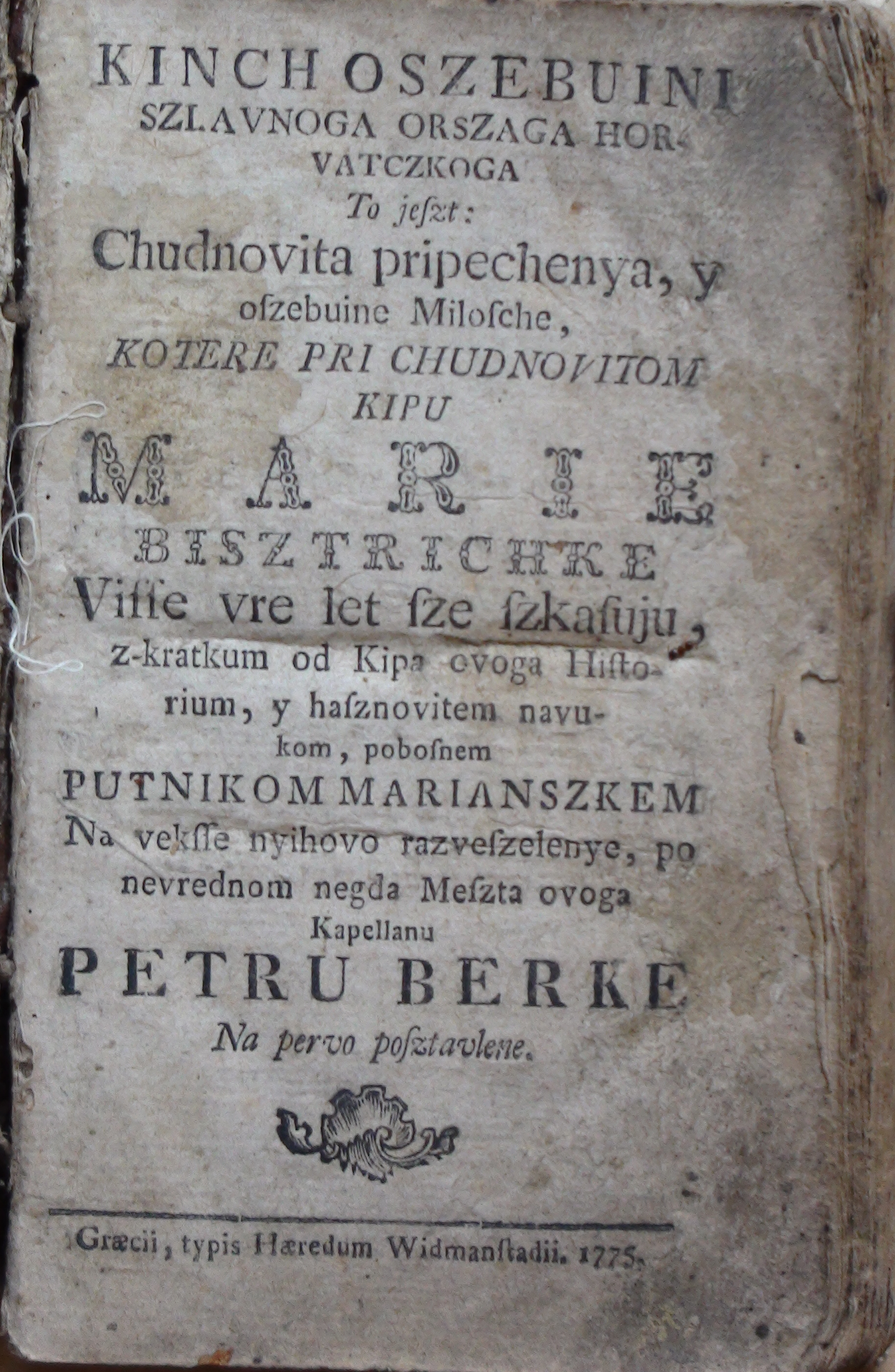 Petar Berke: Kinch oszebuini szlavnoga Orszaga Horvatzkoga (Wonderfull treasure of Croatia) in Kajkavian Croatian language (kajkavski) from 1775